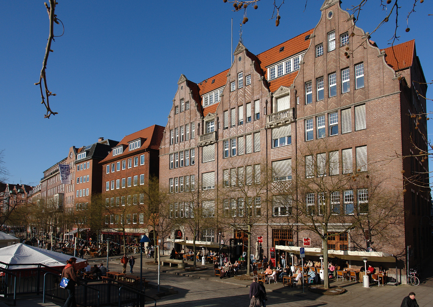 Bebauung an der Schlachte in Bremen. Blick von der Teerhofbrücke. Das dreigiebelige Kontorhaus rechts wurde 1913 von der ehemaligen Bremer Handelsspedition J.H. Bachmann als Firmensitz erstellt und nach Kriegszerstörungen 1948 in der alten Form wiederaufgebaut. Seit 2006/07 befindet sich darin u. a. der Deutschlandsitz des Nachfolgeunternehmens DVS Sea & Air GmbH, die zum dänischen Logistikkonzern DSV A/S gehört. Die Gesamtanlage ist ein geschütztes Kulturdenkmal in der Freien Hansestadt Bremen, mit der Nr. 1101 beim Landesamt für Denkmalpflege registriert.